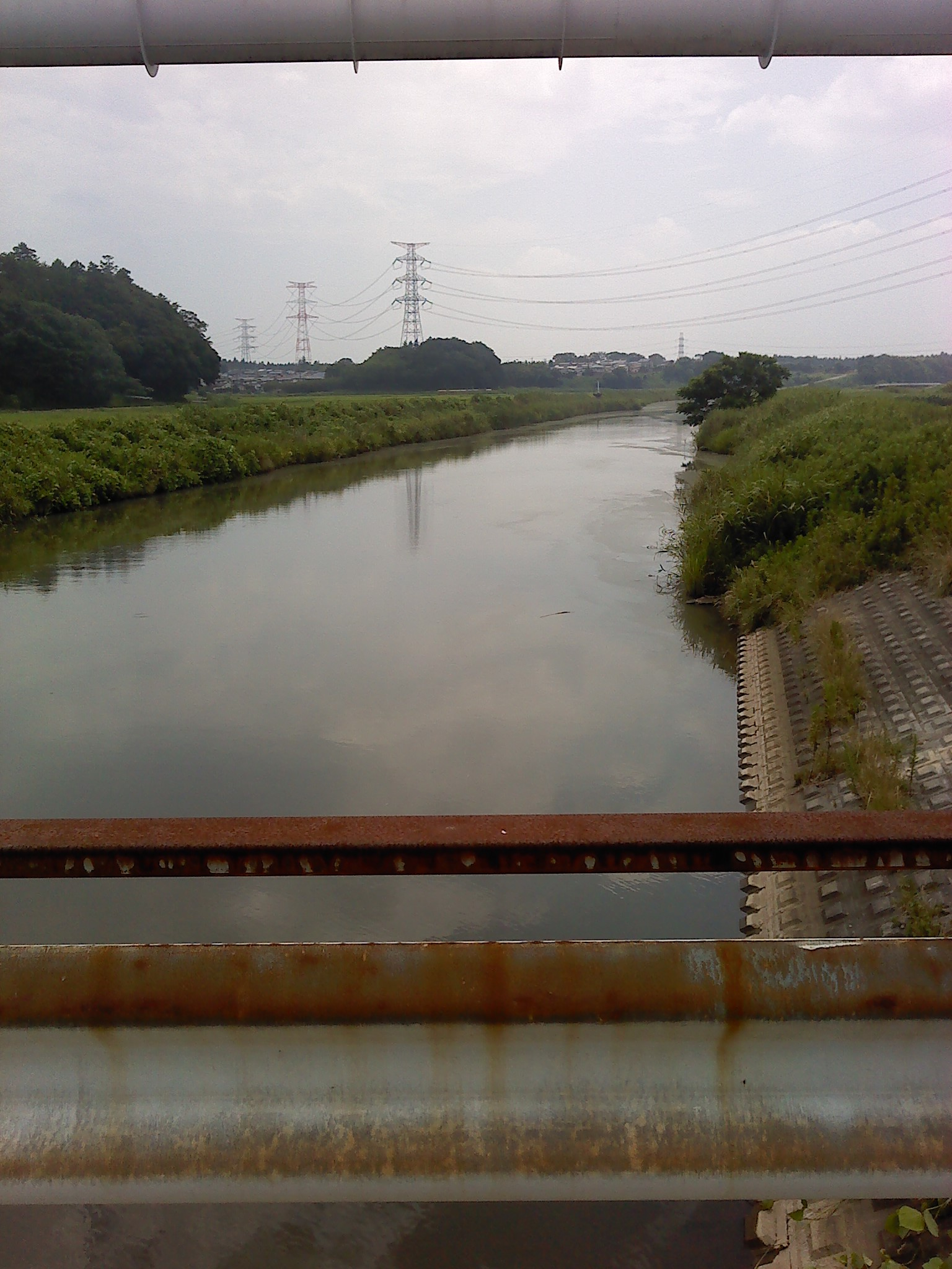 谷田川(つくば市)に架かる丸山橋からとりました